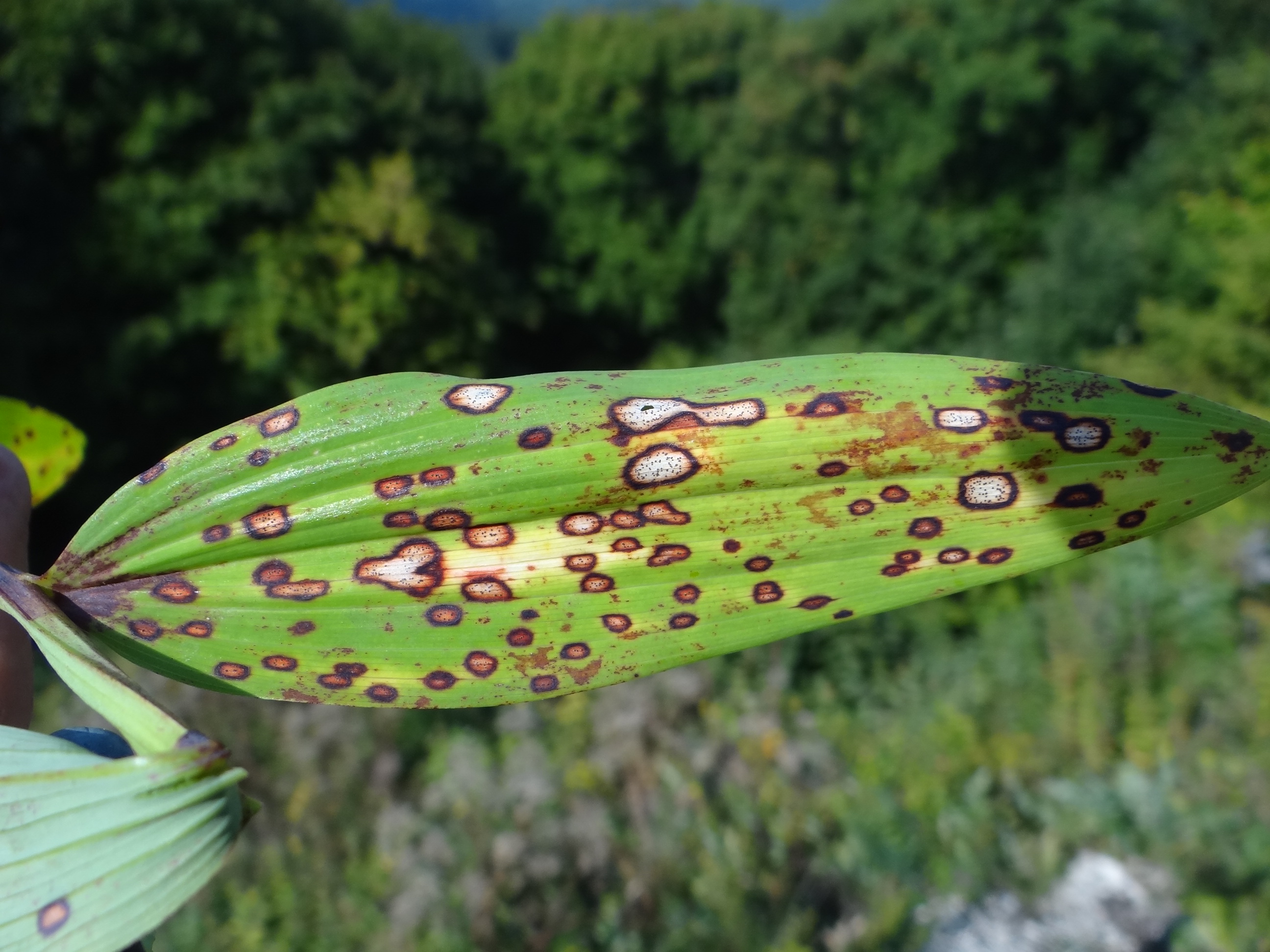 Phyllosticta cruenta on Polygonatum odoratum. Location: Poland, Ryczów, woj. śląskie) (Łysa Pałka)